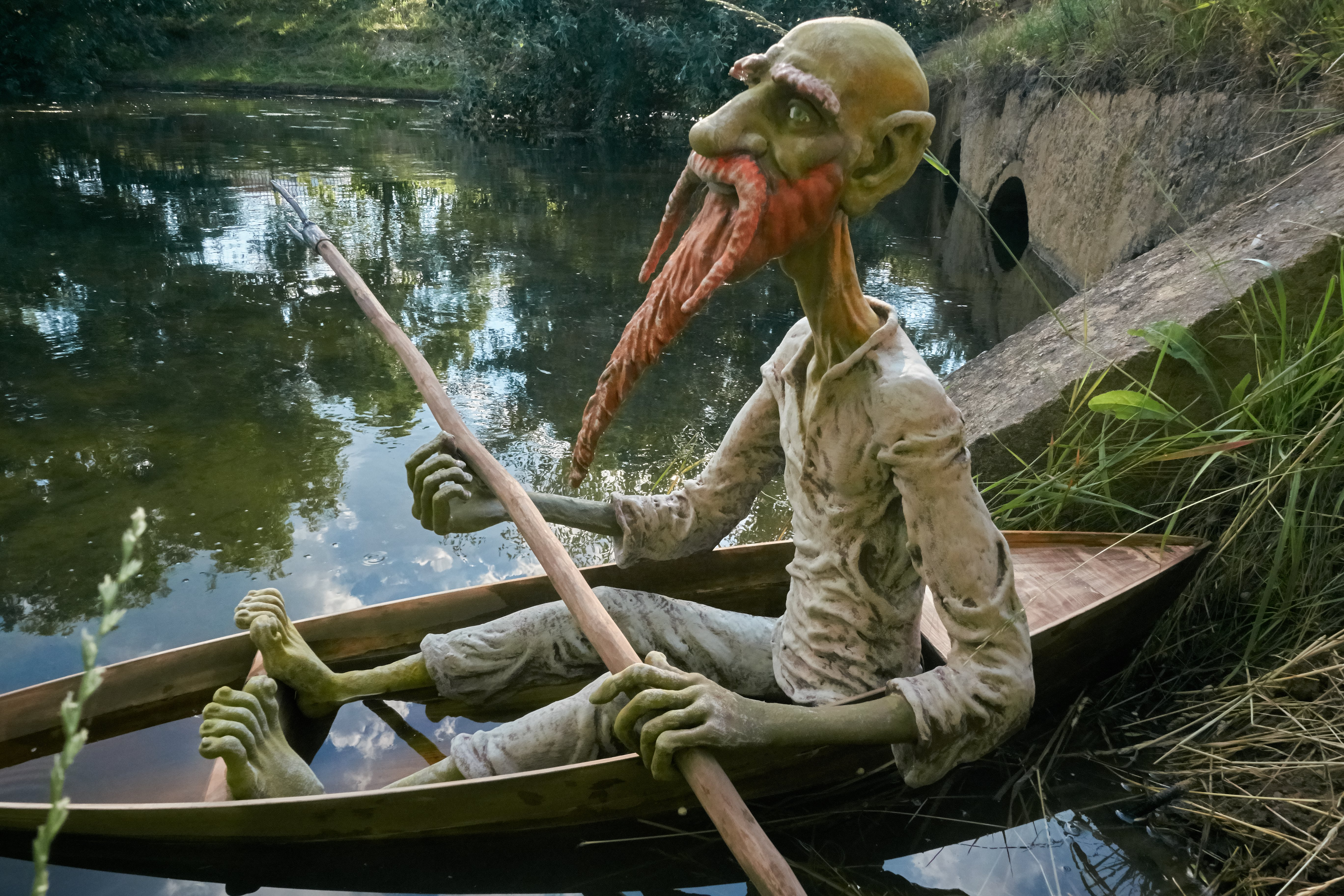 Жевжик - белорусский мифологический персонаж